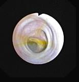 Cholangioscopy